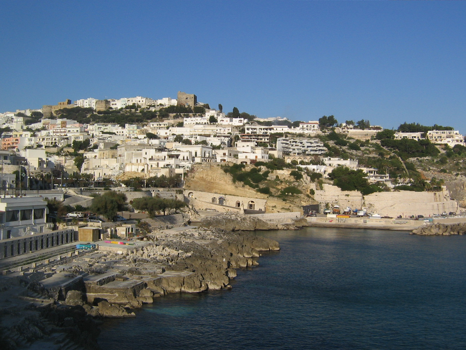 Castro vista dal mare